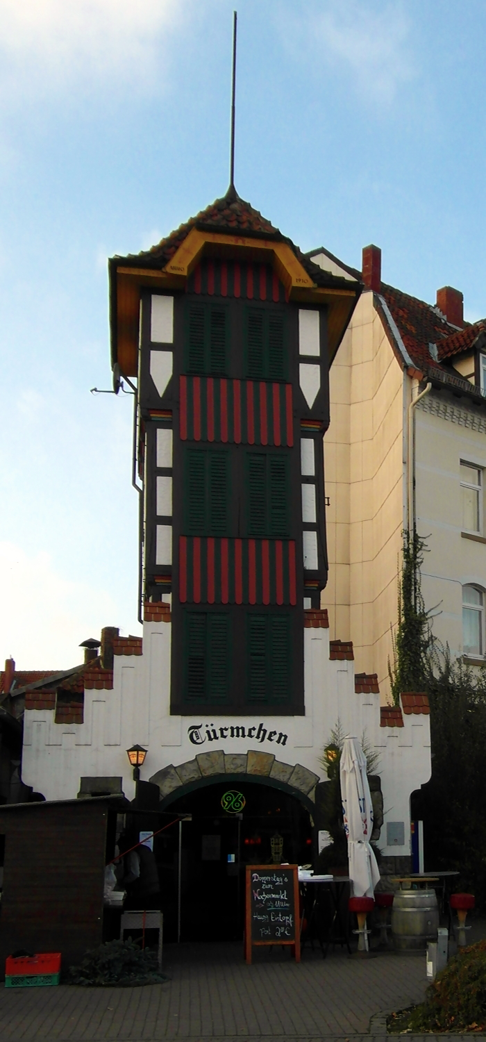 Das Türmchen ist ein Baudenkmal in der Stadt Gehrden in der Region Hannover in Niedersachsen. Das ehemalige Spritzenhaus dient seit 1976 als Gaststätte